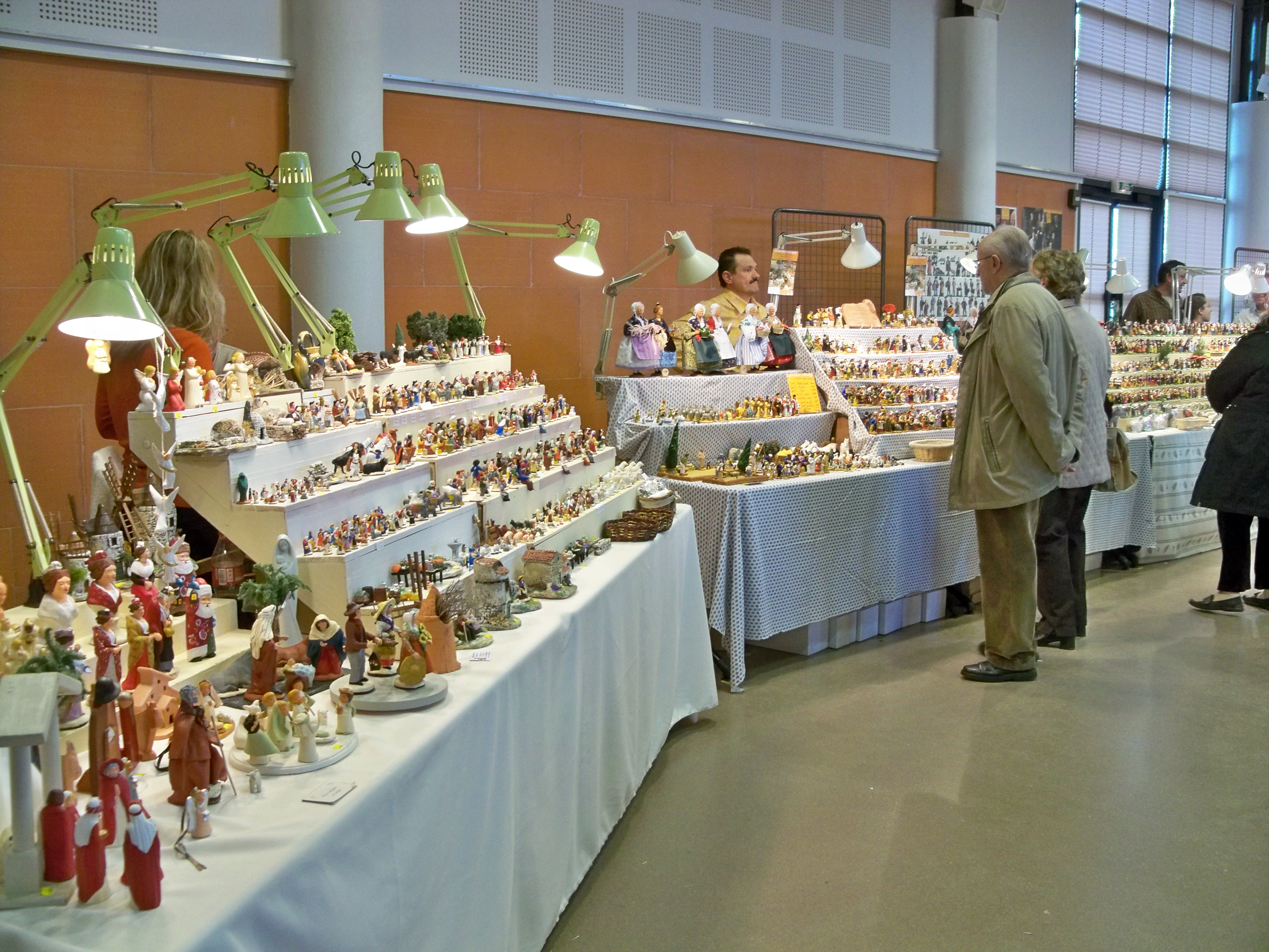 Foire aux santons du marché de noël de Fontvieille, Bouches du Rhone, France